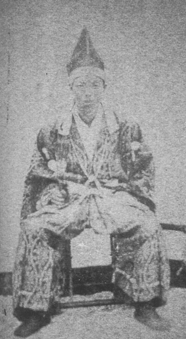 三浦顕次 Miura Takatugu.